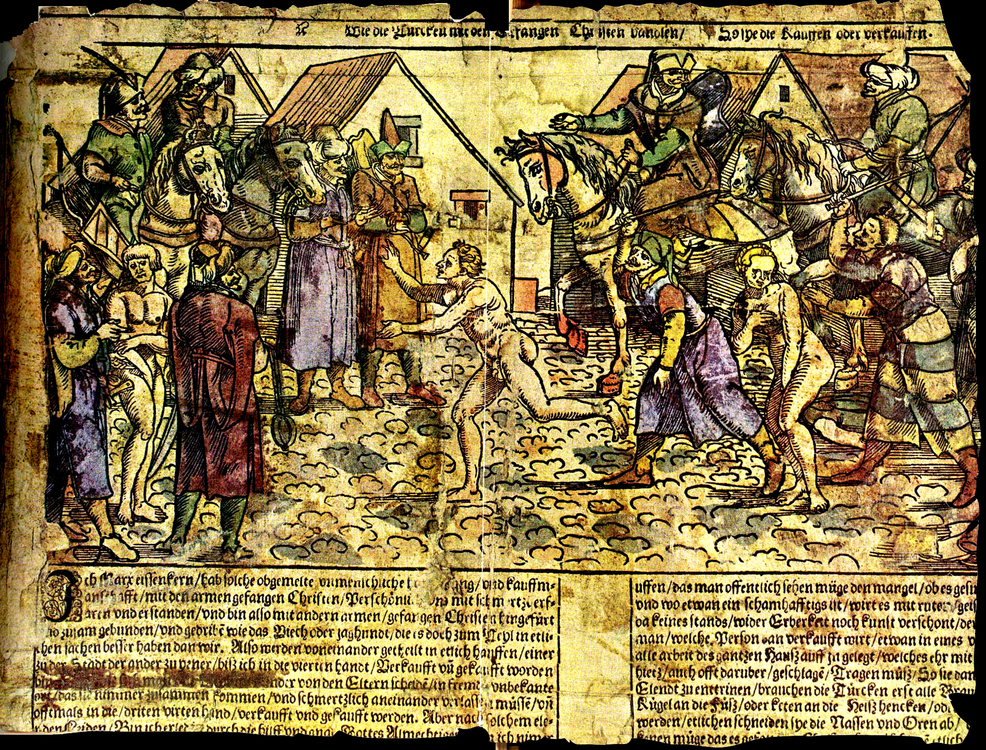 Erhard Schön metszete török katonákrabszolgákkal kereskednek